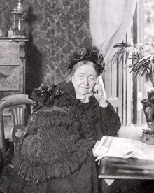 Lotten von Kræmer (1828-1912) på 80-årsdagen